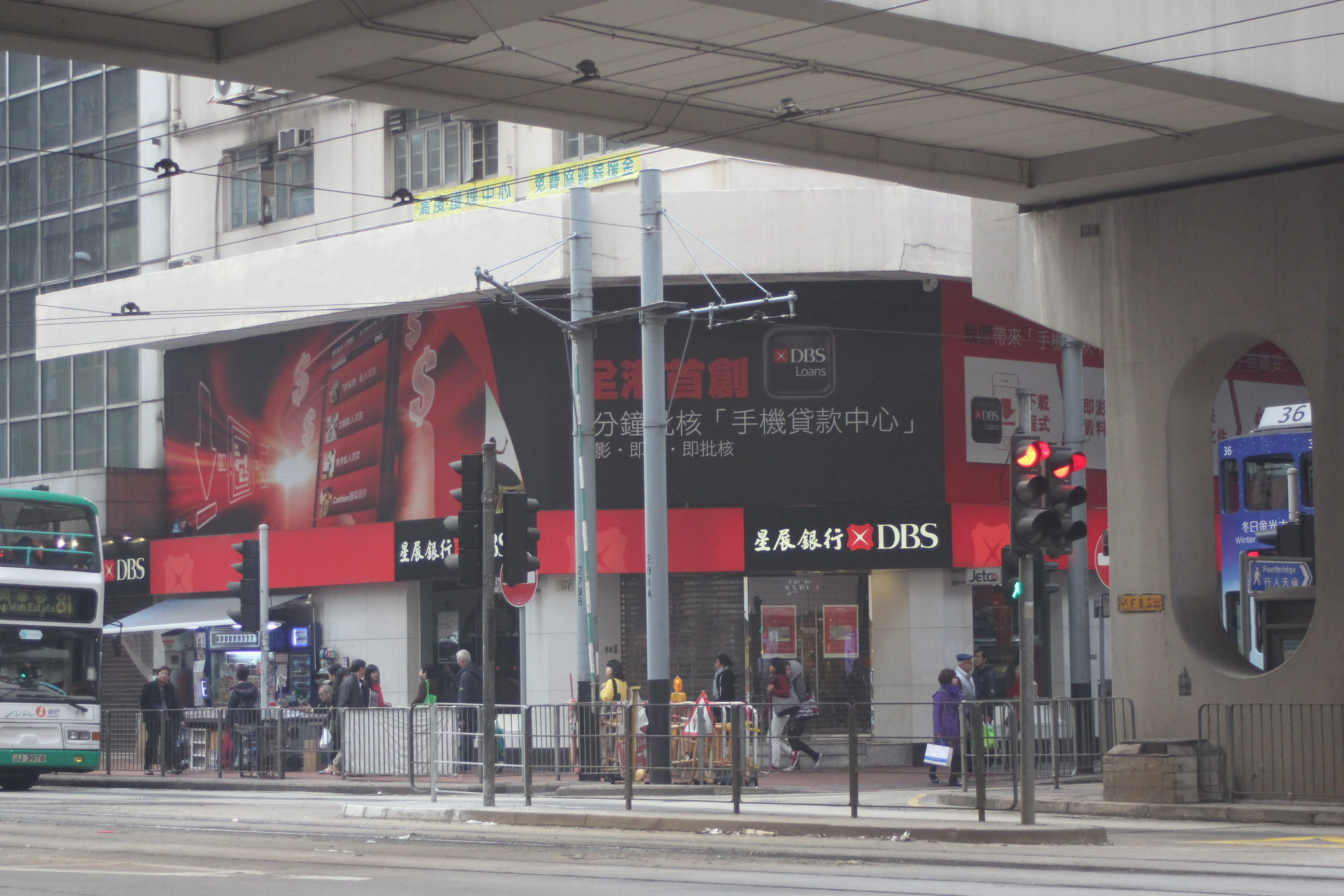 星展銀行 北角分行